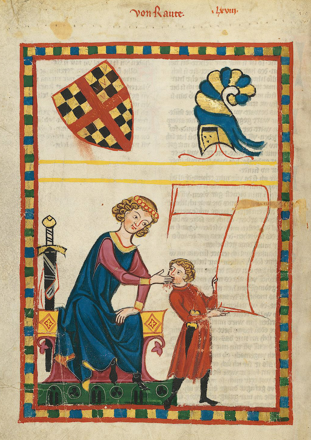 Codex Manesse, UB Heidelberg, Cod. Pal. germ. 848, fol. 248v: Von Raute